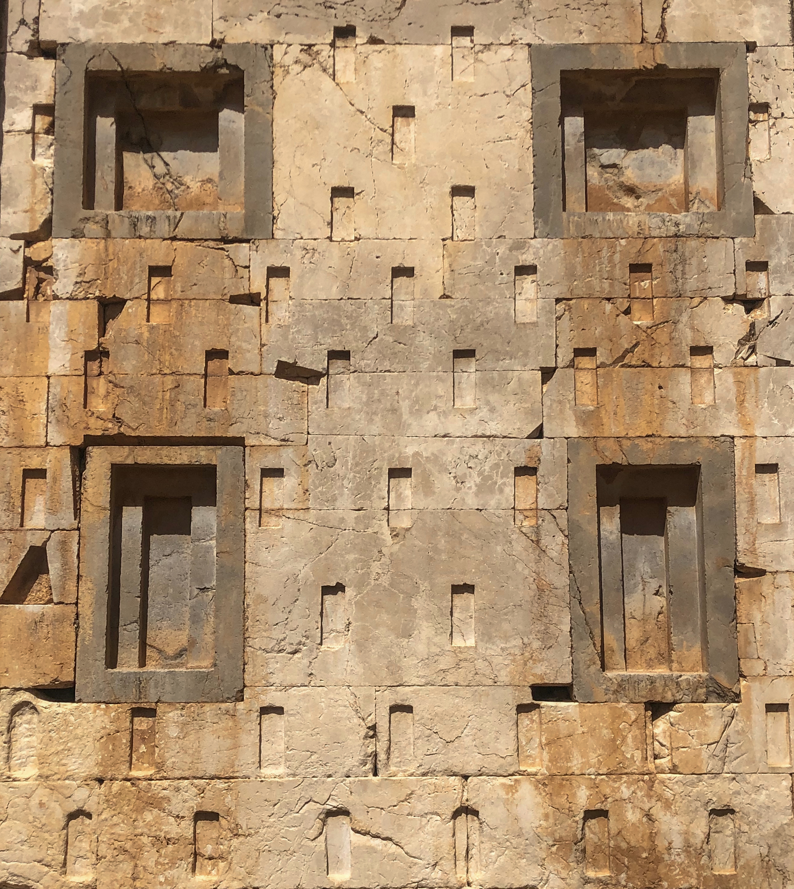 هو نصب تذكاري يمتد قدمه إلى العهد الإخميني، أي حوالي القرن الخامس قبل الميلاد، والنصب مبني على شكل برج في نقش رستم، وهي من الآثار العالمية المهمة، تقع في شمال غرب برسبوليس في إيران،